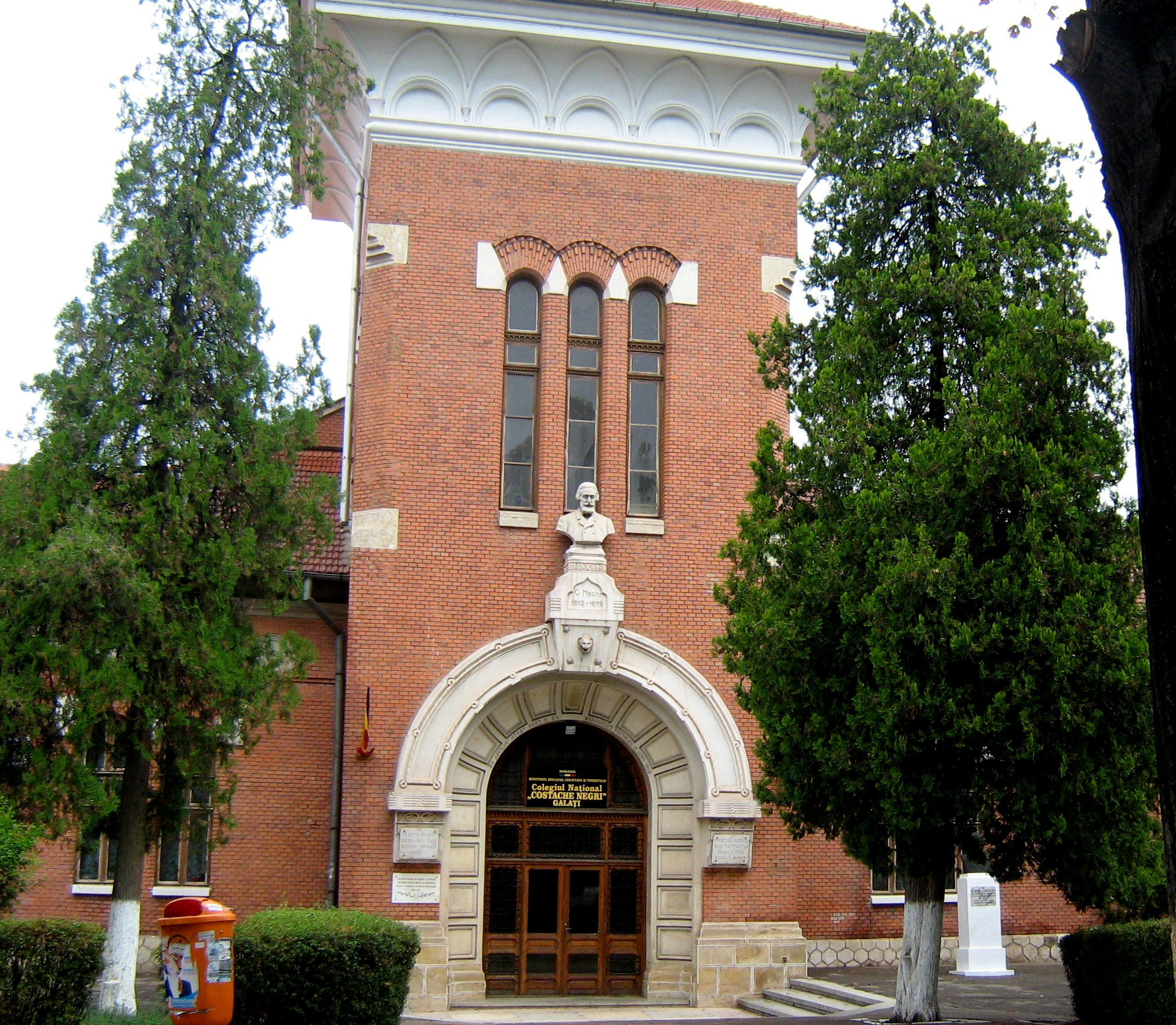 Scoala Normala Costache Negri